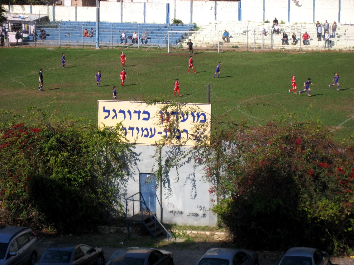 מגרש הכדורגל של מכבי רמת עמידר